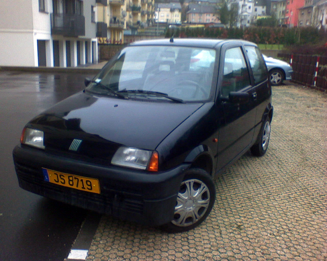 Bild vun mengem Fiat Cinquecento an engem privatem Parking zu Schëffleng.